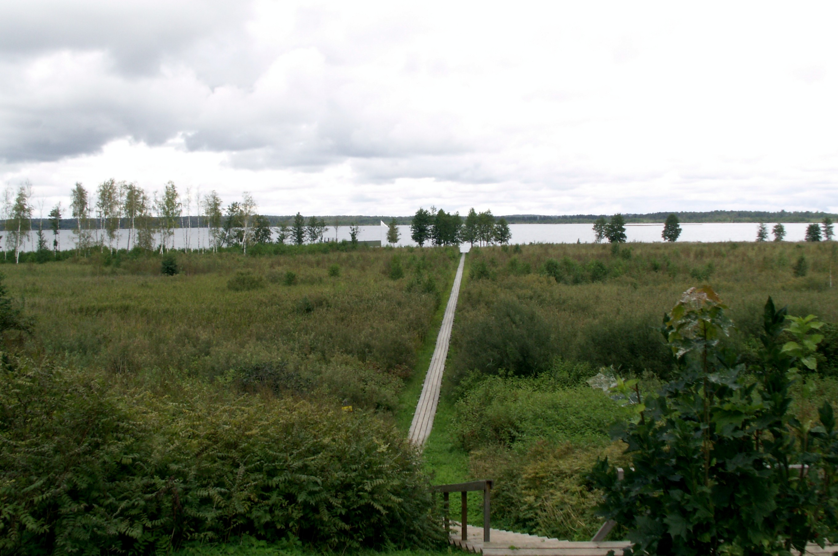 Lielaucės ežeras, Lielaucės pagastas, Latvija